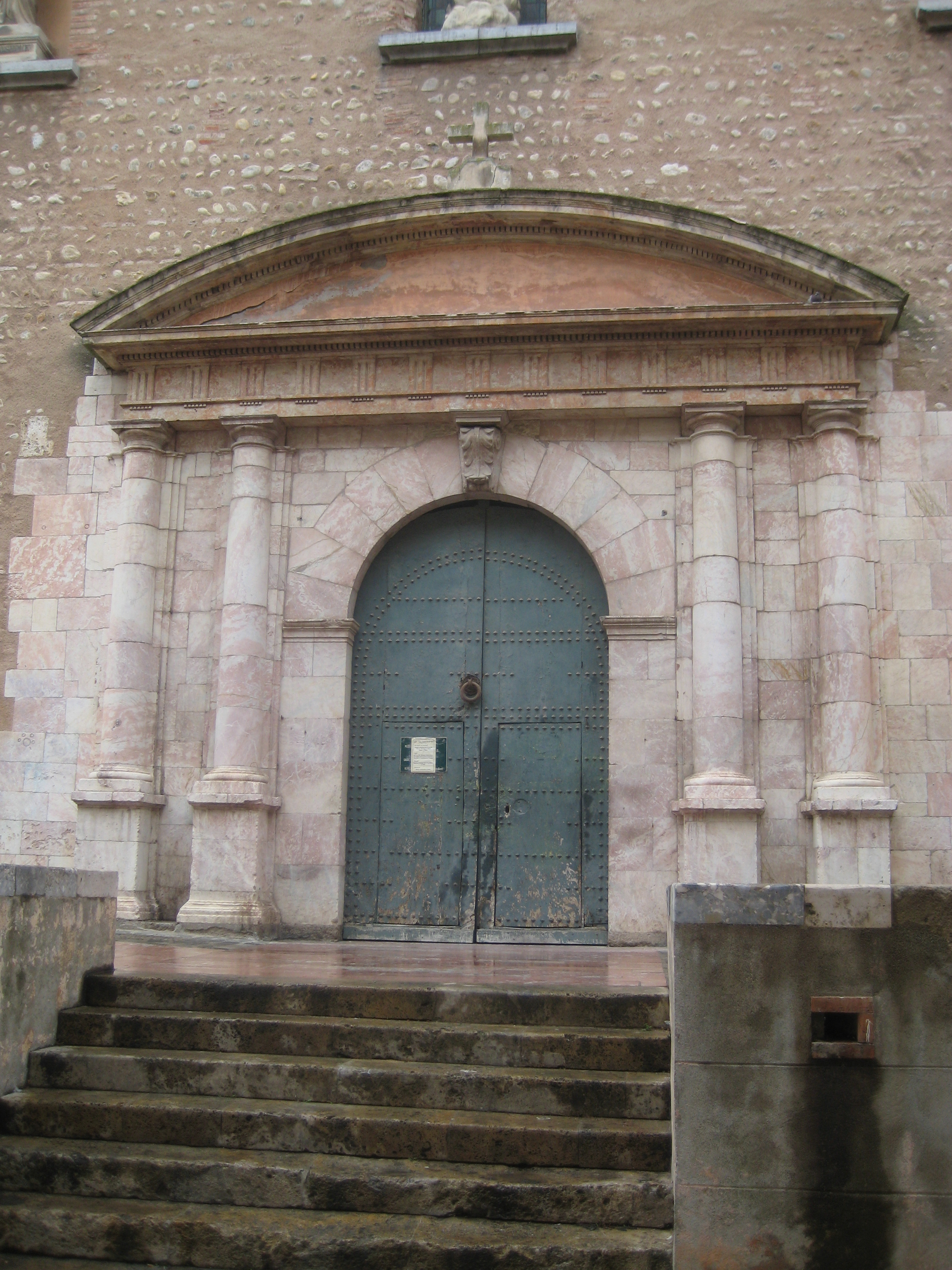 Église de la Réal .